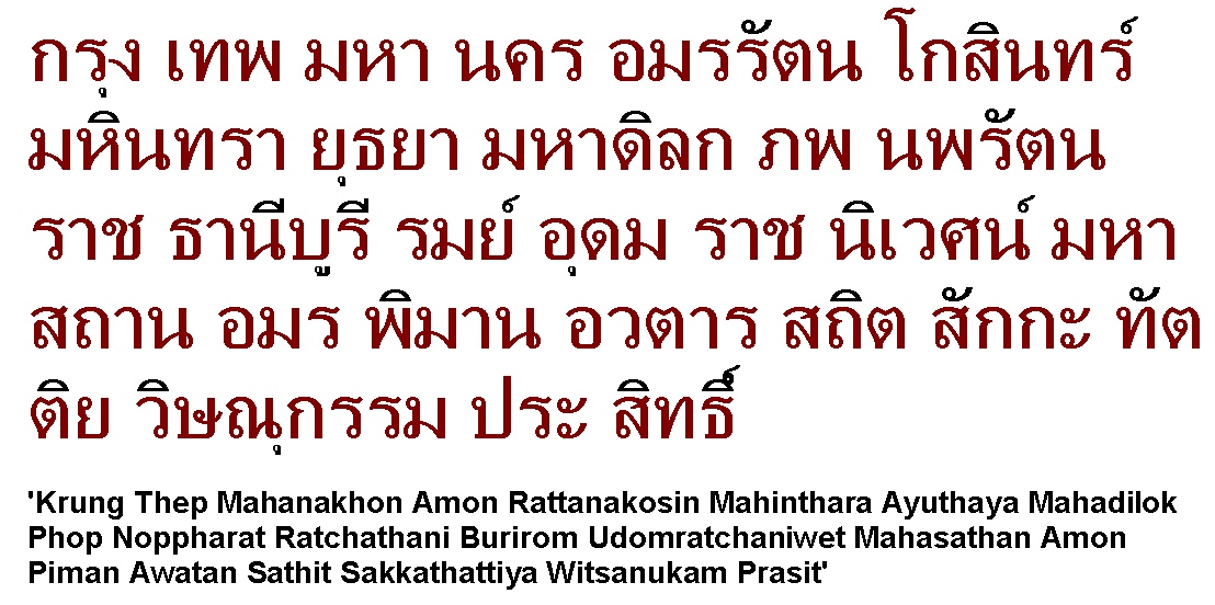 Bangkok auf Thai. Der vollständig Name Bangkoks in Thai-Schrift